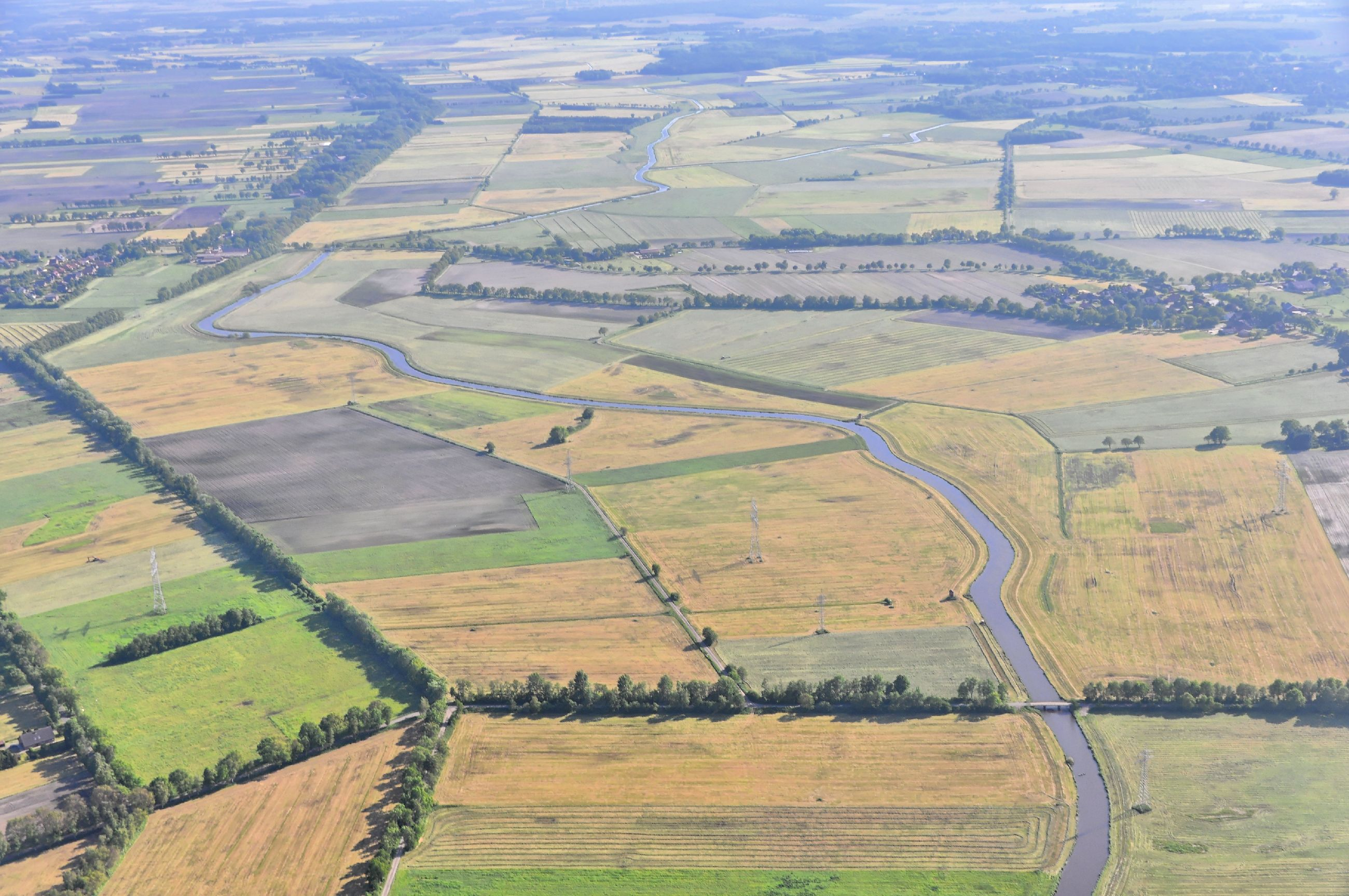 Überführungsflug vom Flugplatz Nordholz-Spieka über Lüneburg, Potsdam zum Flugplatz Schwarzheide-Schipkau